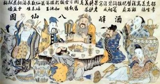 Прийом їжі заможніми китайцями